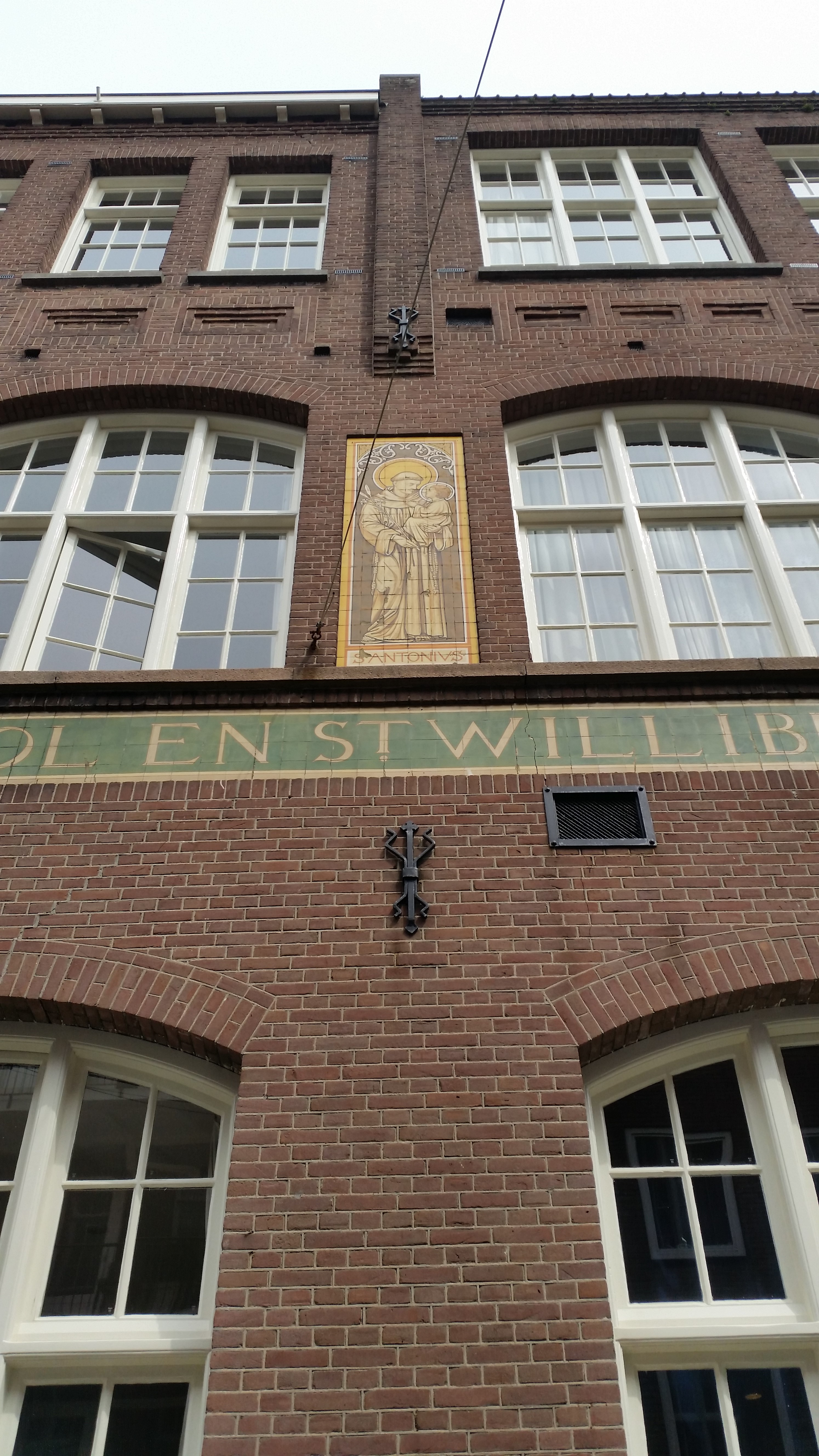 Impressie van Fokke Simonszstraat 45-49, Amsterdam